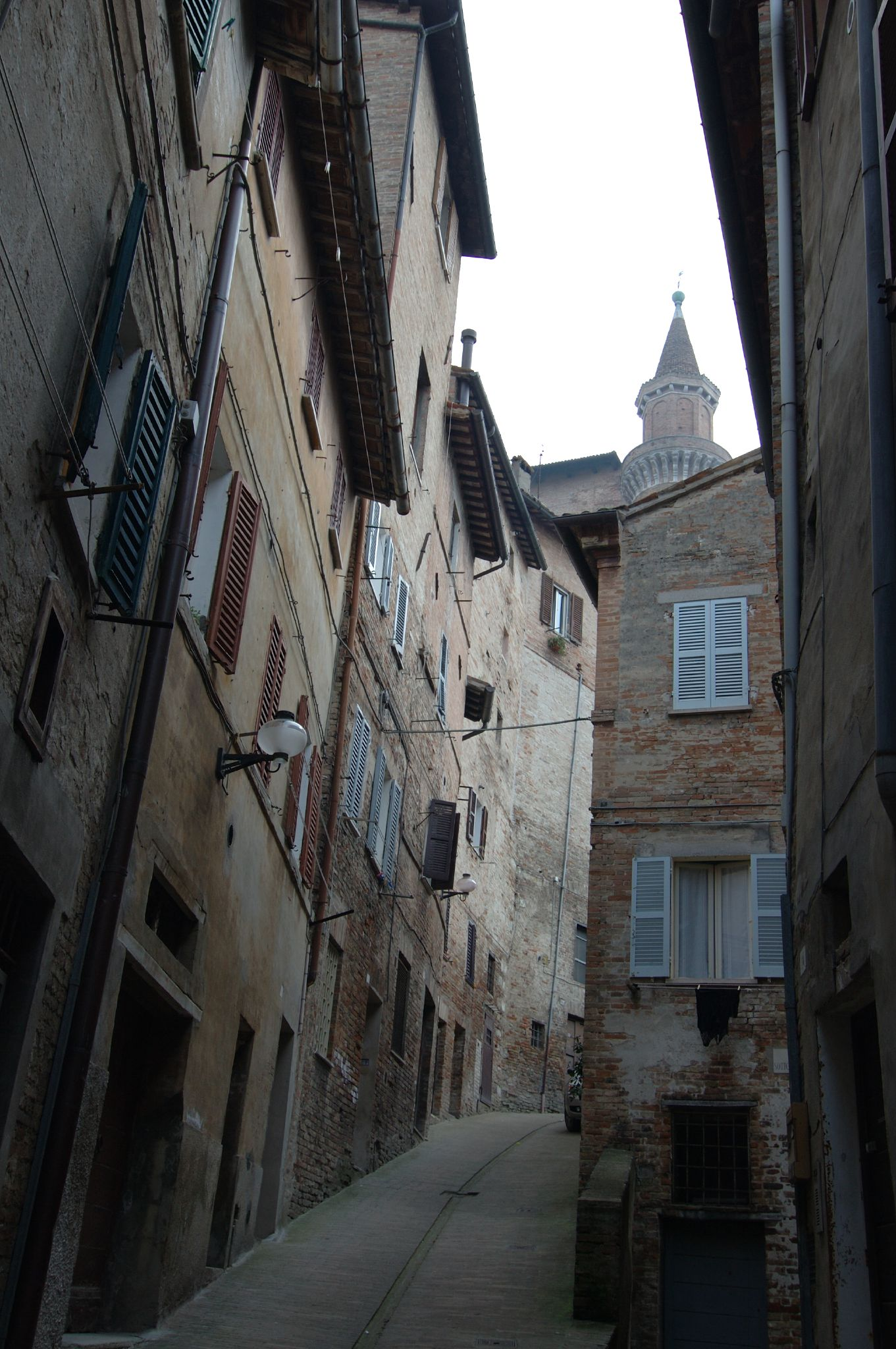 Urbino, Marche, Italia